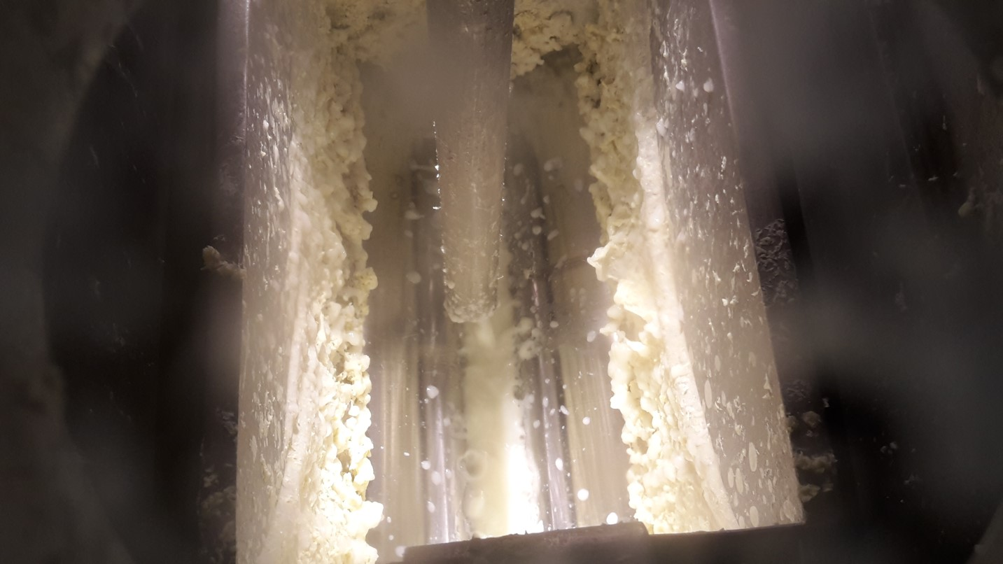 Bild aus einem Technikumsversuch. Der im Lösemittel enthaltenen Feststoff wird abgetrennt. Feststoff und Flüssigkeit werden nach dem Vorgang weiterverarbeitet, bzw. in gereinigter Form wiederverwendet.